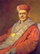 Prof. MUDr. Jindřich Matiegka, RNDr. h.c.